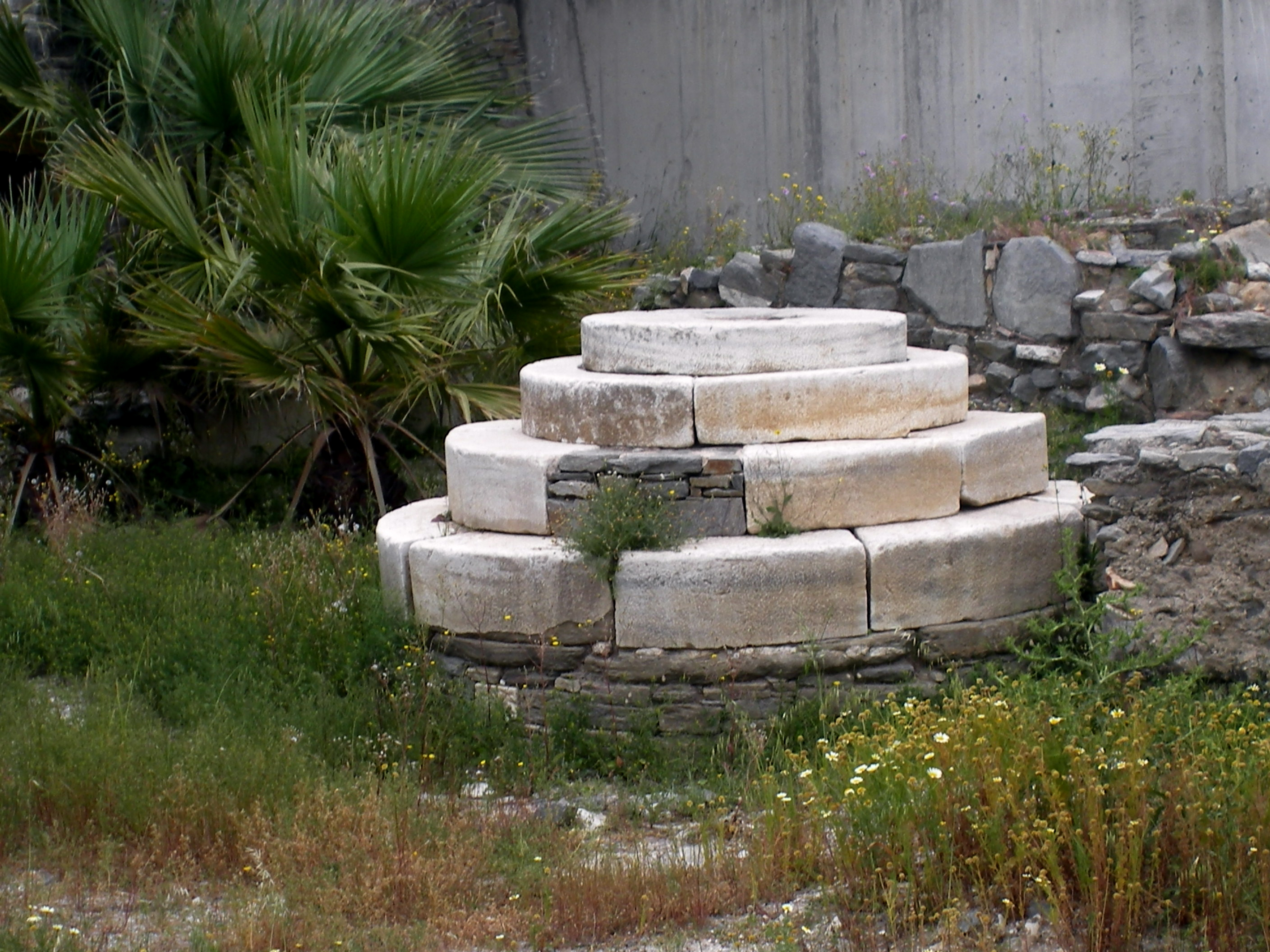 Hérôon archaïque, trouvé au lieu-dit Aghios Panteleimon, à l'est de Parikia (sur Paros). Base circulaire de 1,90m de diamètre. Sa structure circulaire en escalier rappelle le monument funéraire à Theagenes sur Thasos (colonie parienne). Cette base supportait soit une statue, soit une stèle soit une colonne votive. Des inscriptions y ont été retrouvées ainsi que des dessins.